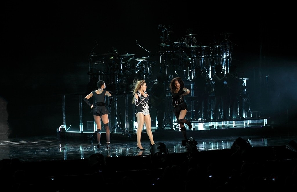 Beyonce durante el I am... Tour en Budapest Hungría